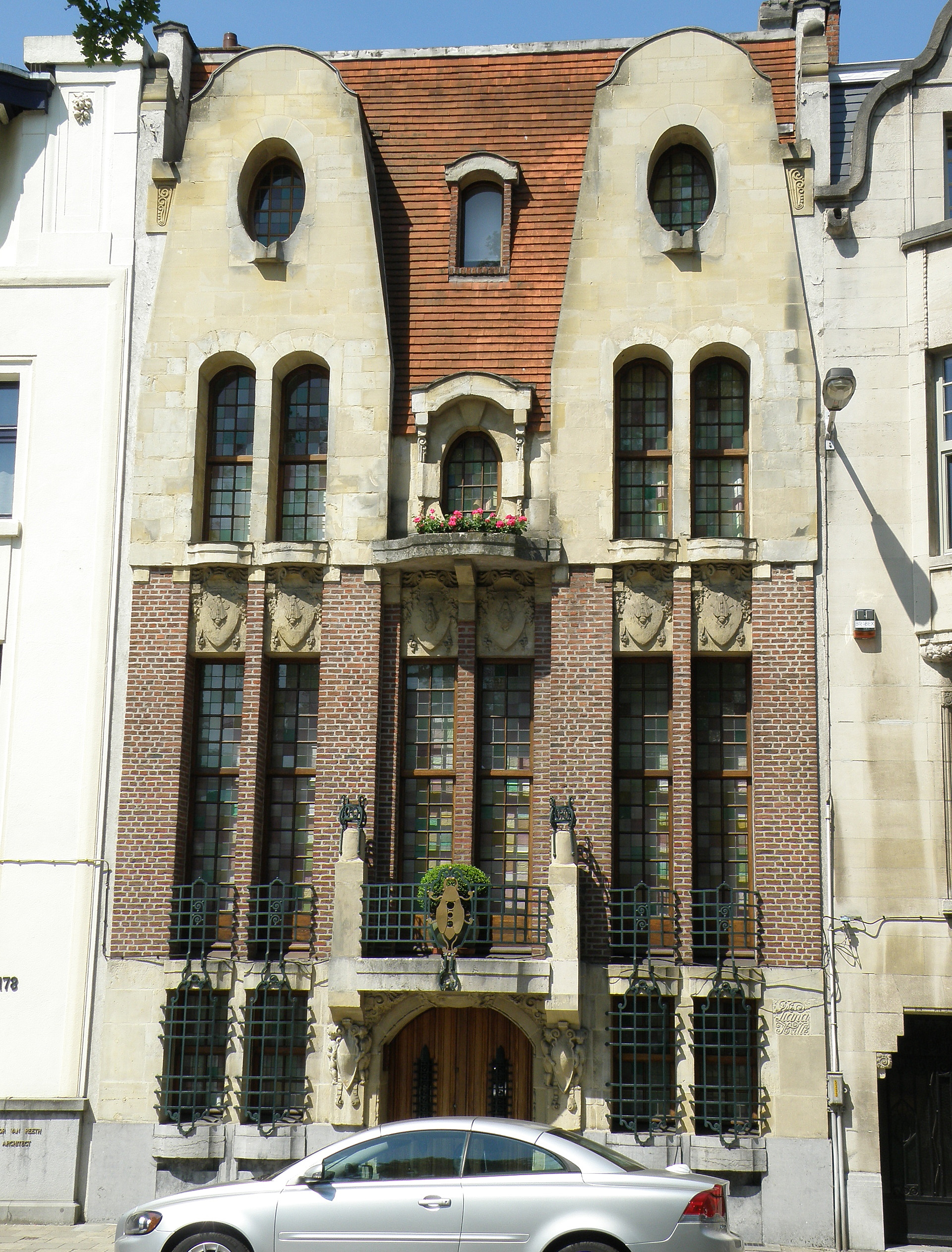 Anvers, Belgique. Maison individuelle de style Art déco, dénommée De Liana-Halle, sise Boekenberglei n° 176 à Deurne, faubourg (district) de la proche banlieue est d’Anvers. Œuvre (et habitation personnelle) de l’architecte Jef Huygh, 1923.